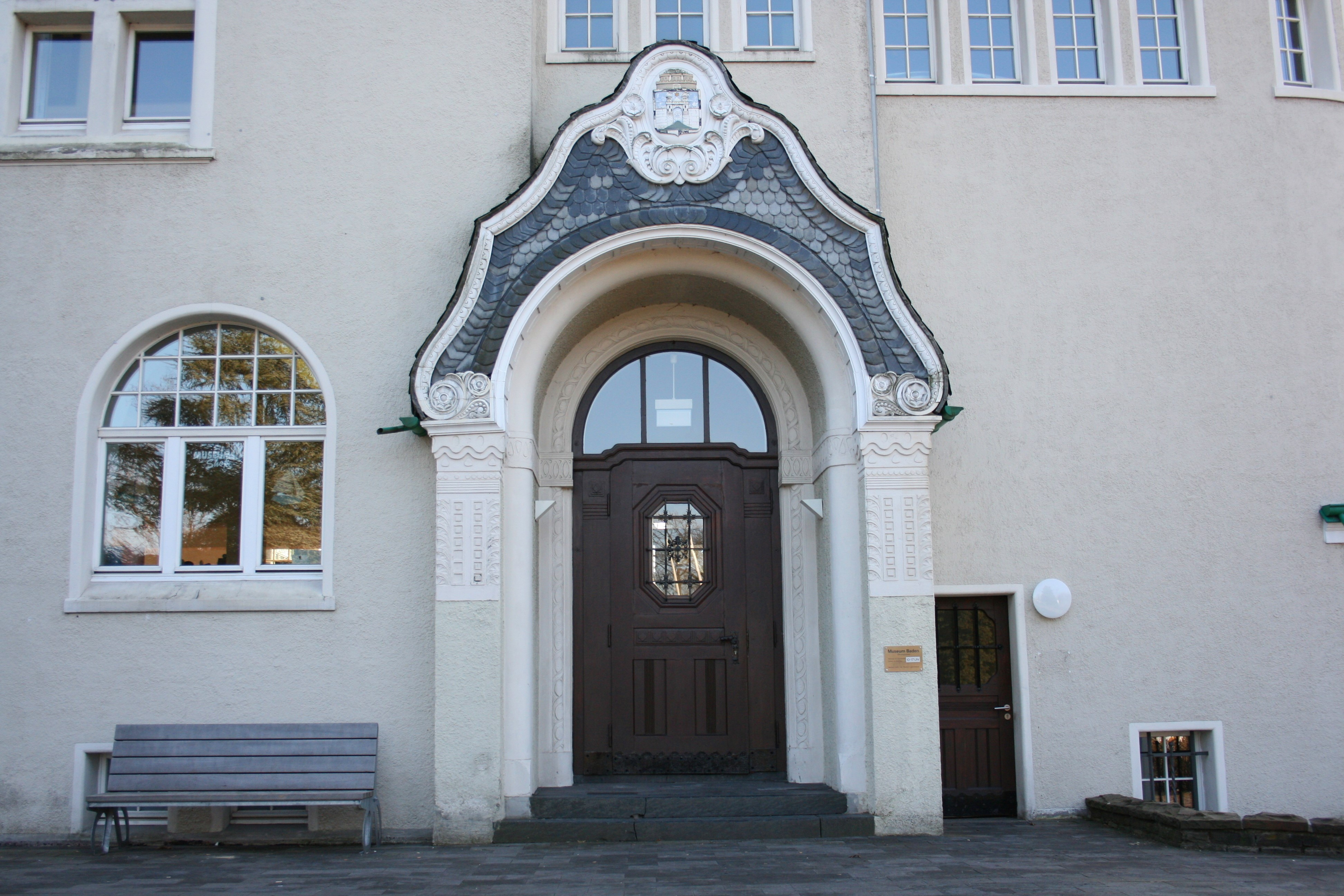 Museum Baden in Solingen-Gräfrath